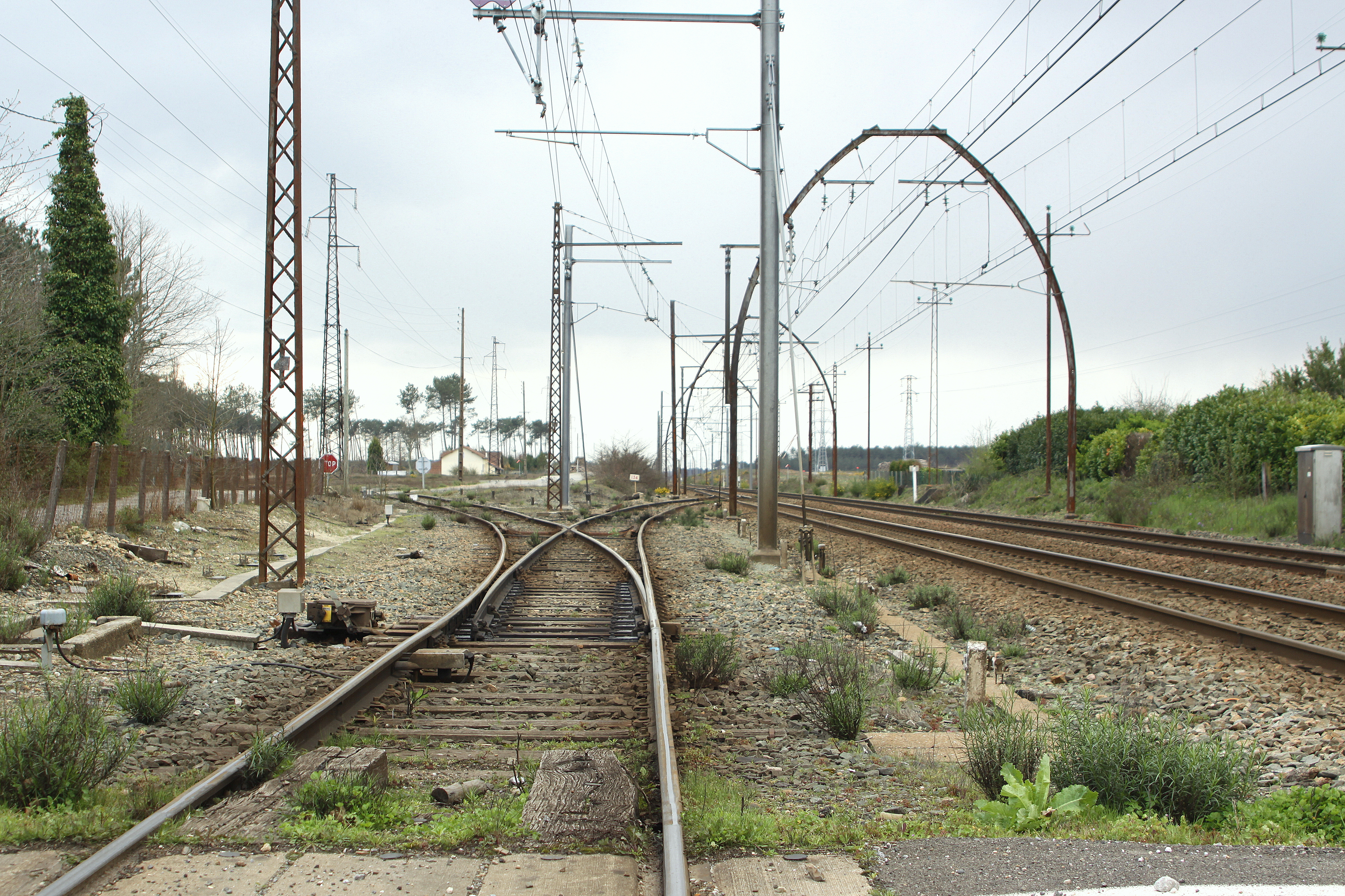 Gare de Laluque (Landes, France) : bifurcation entre la voie VFL (au premier plan) et les voies SNCF (ex-Midi)